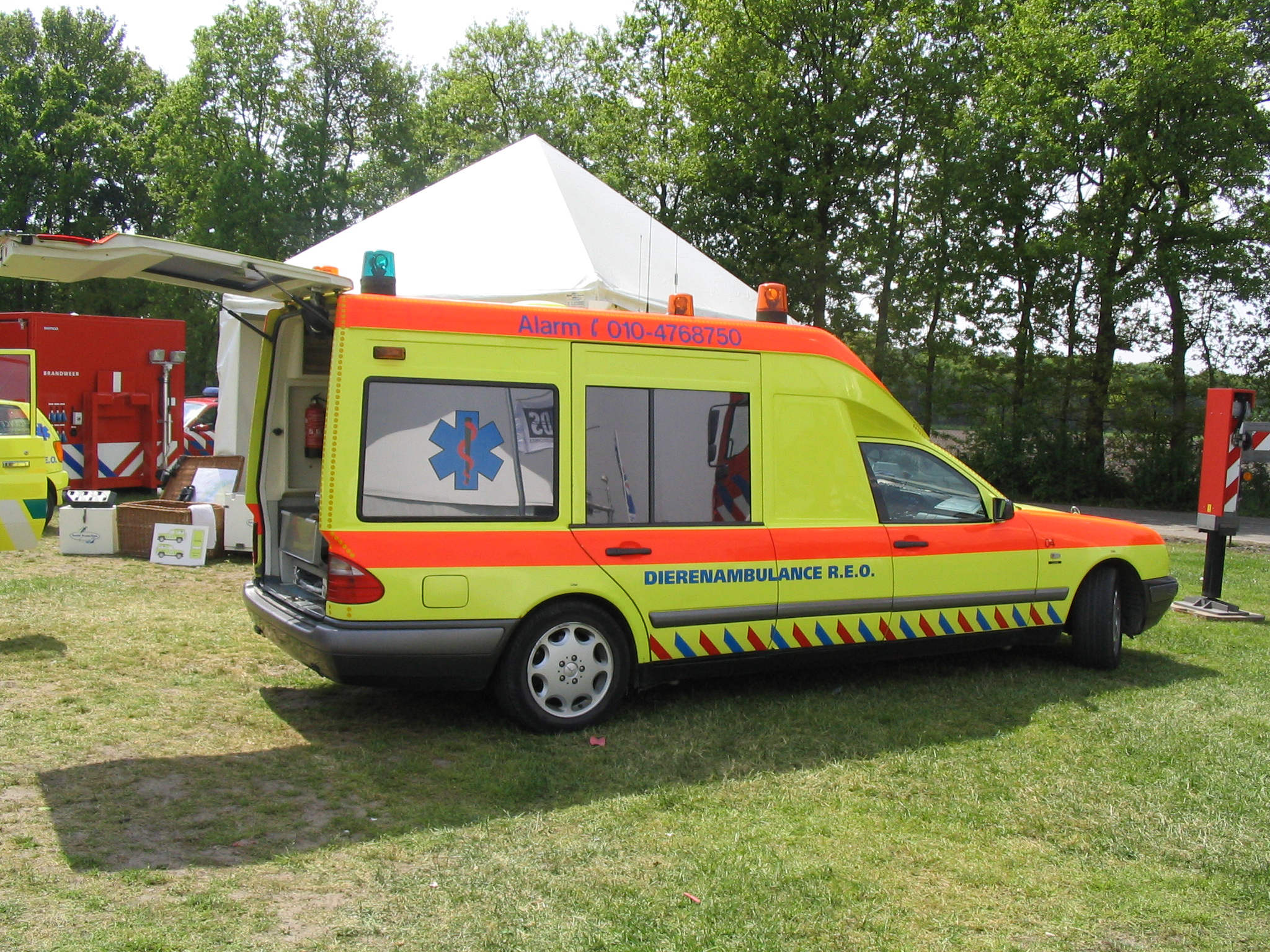 zelf gemaakte foto